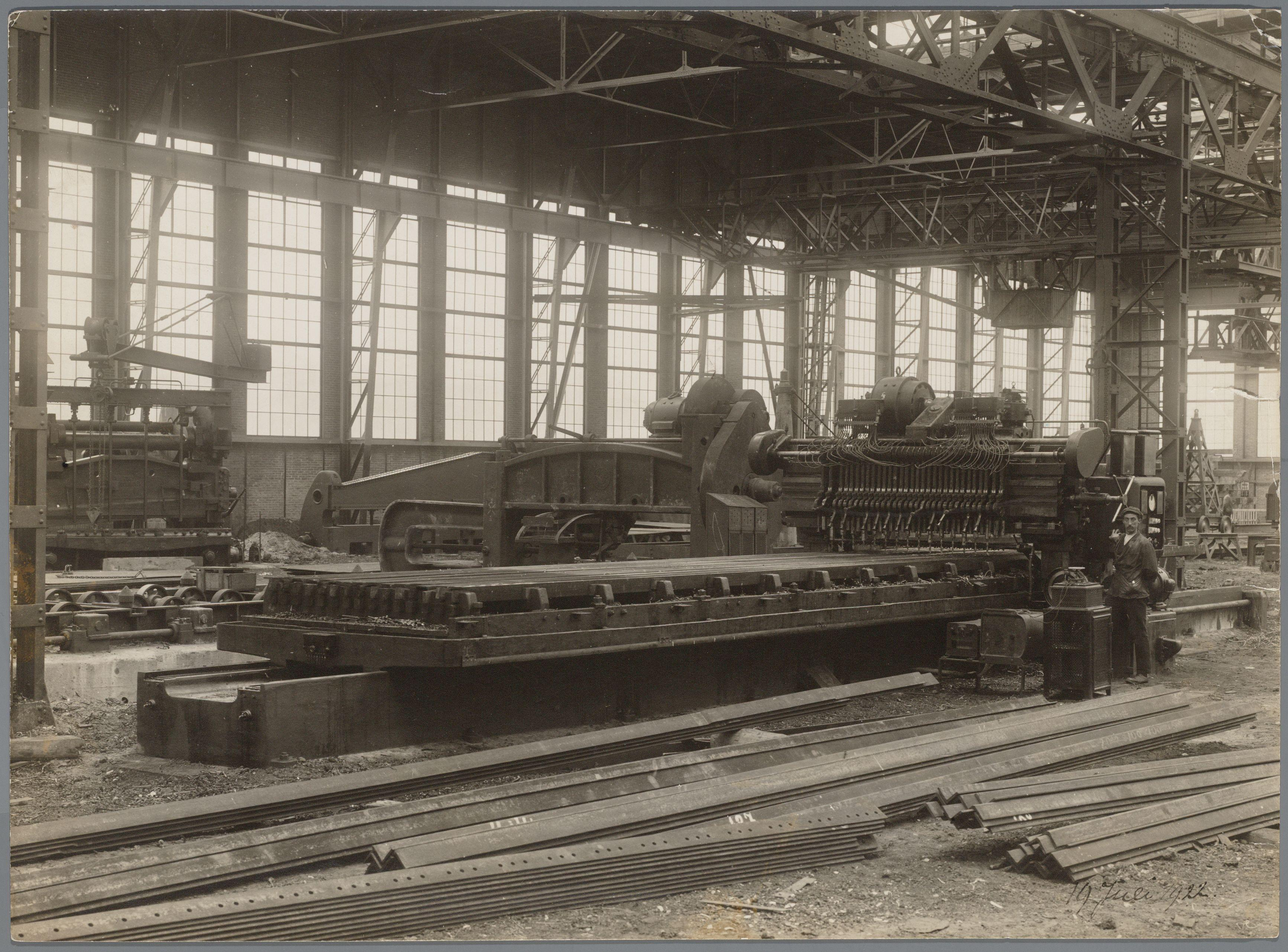 Beschrijving Blik in de machinefabriek op de N.S.M.-werf aan de Cornelis Douwesweg Documenttype foto Vervaardiger Oosterhuis, Gustaaf (1858-1938) Collectie Archief Nederlandse Dok- en Scheepsbouw Mij.: foto's Datering 19 juli 1922 Inventarissen Afbeeldingsbestand 010179000317 Generated with Dememorixer